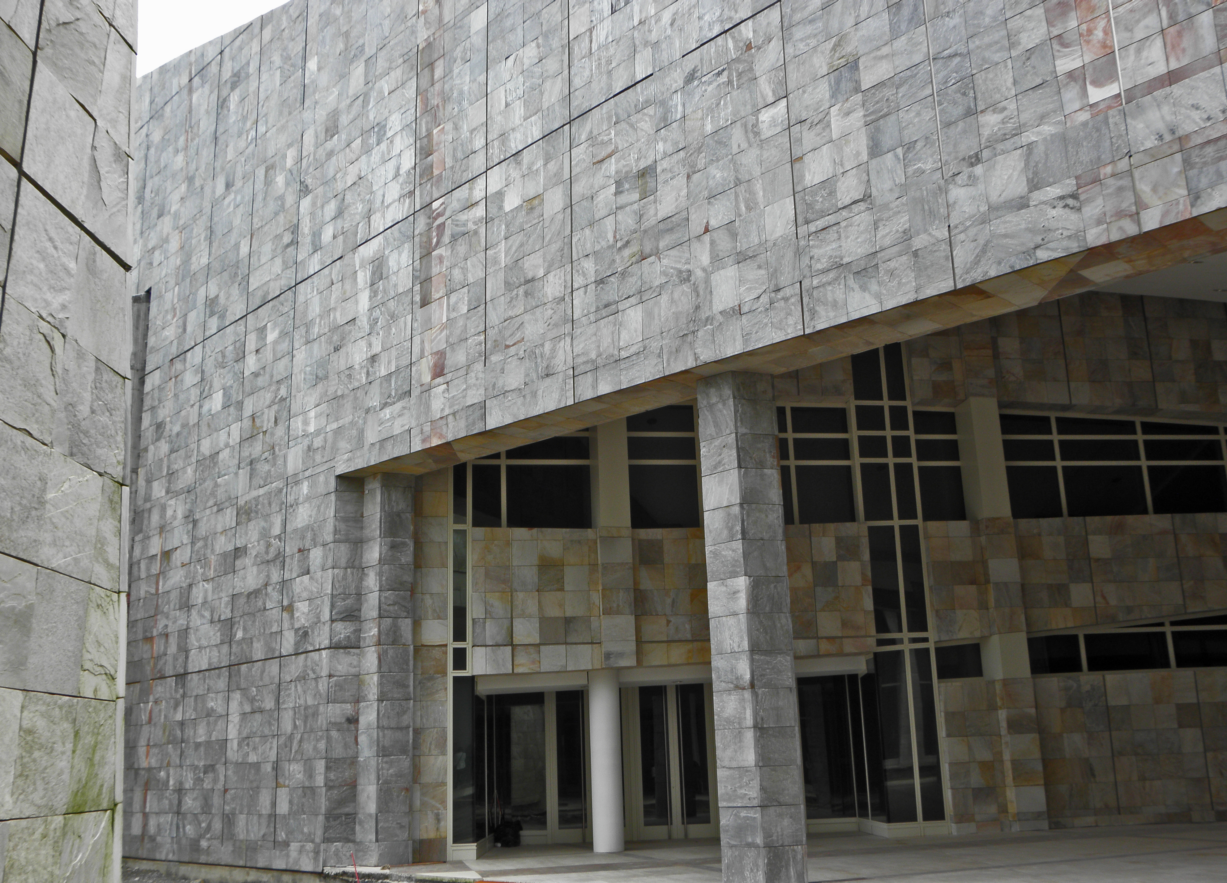 Biblioteca, Cidade da Cultura